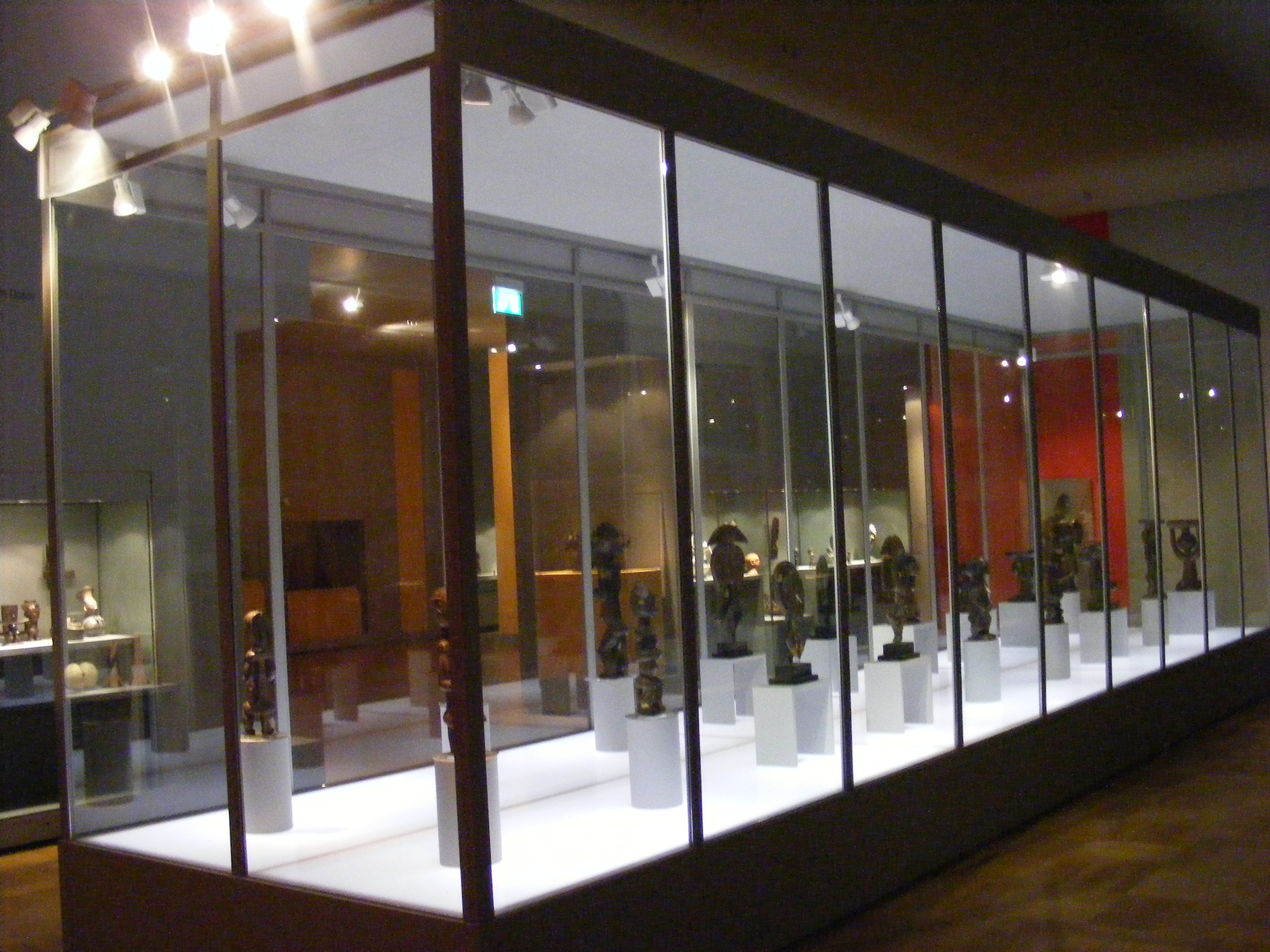 Zentrale Vitrine der Dauerausstellung “Afrika” des Staatlichen Museums für Völkerkunde München